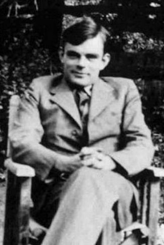 Alan Turing az 1930-as években.